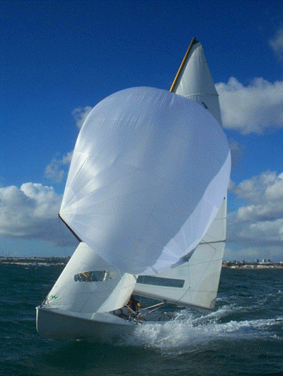 470 Gildas Philippe ha Tanguy Cariou.